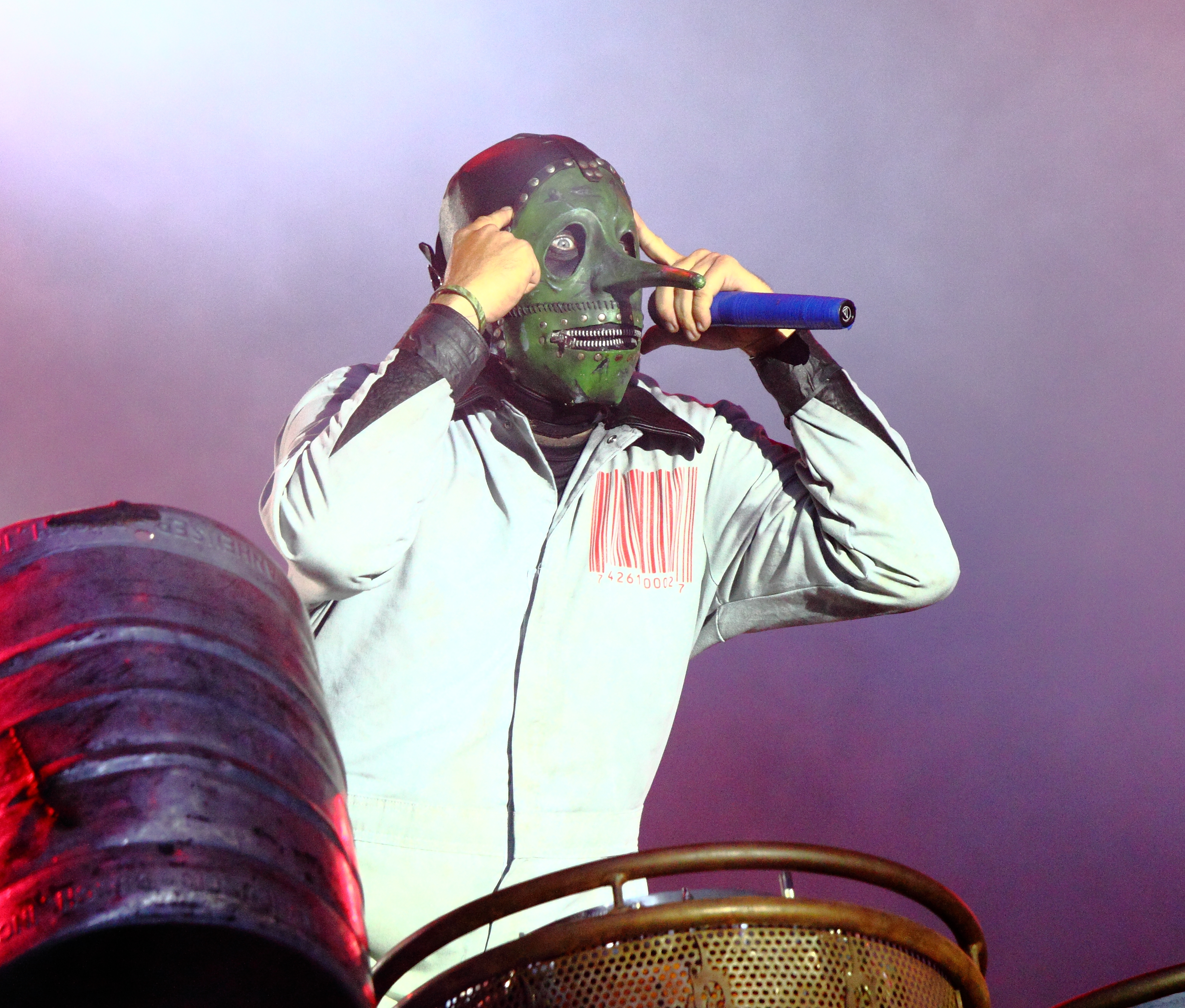 Slipknot live at Roskilde Festival 2013